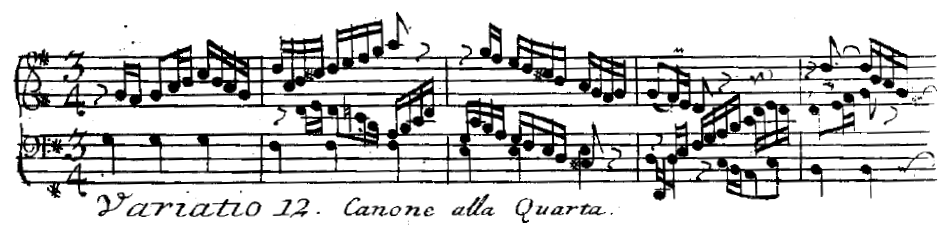 Beginn der Variation 12 aus den "Goldberg-Variationen" BWV 988